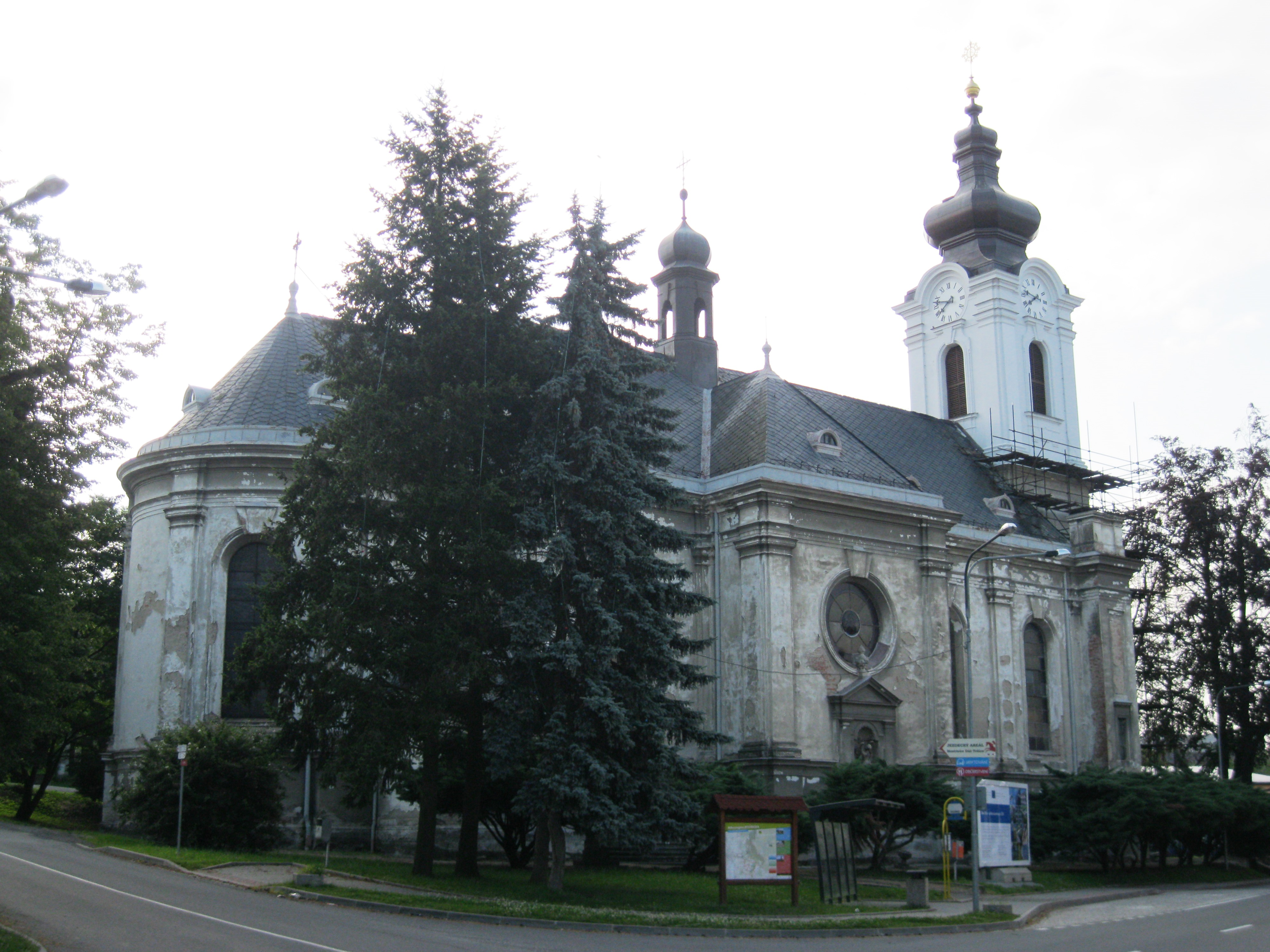 Kostel Narození P. Marie (Tršice), Tršice